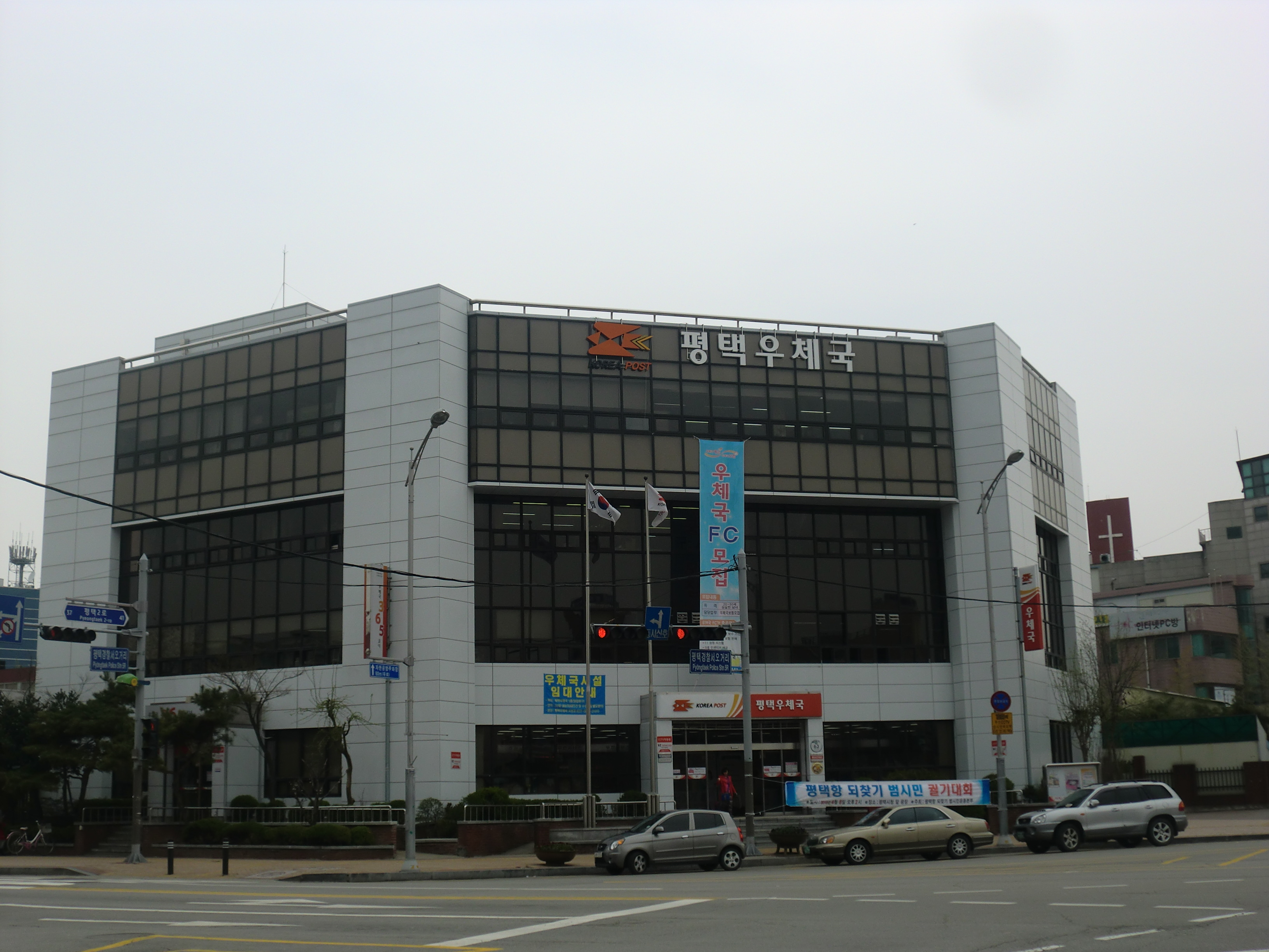 경기도 평택시에 있는 평택우체국